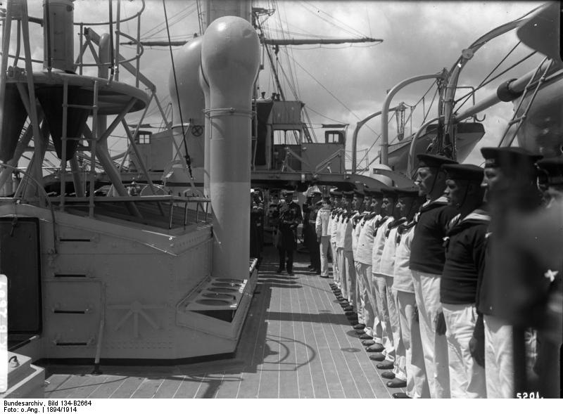 Besuch Kaiser Wilhelm II. auf der SMS "Geier" SMS "Geier", Kleiner Kreuzer; Besichtigung des Schiffes durch Kaiser Wilhelm II. [Kleiner geschützter Kreuzer "Geier", Stapellauf 18.101894 auf der Kaiserlichen Werft in Wilhelmshaven, bestimmt zum Einsatz in den Überseegebieten, 1914 auf Hawaii internet, nach Kriegseintritt der USA konfiziert, in USS "Schurz" umbenannt, 1918 nach K] Abgebildete Personen: Wilhelm II.: Deutsches Reich, Kaiser, II., Deutschland